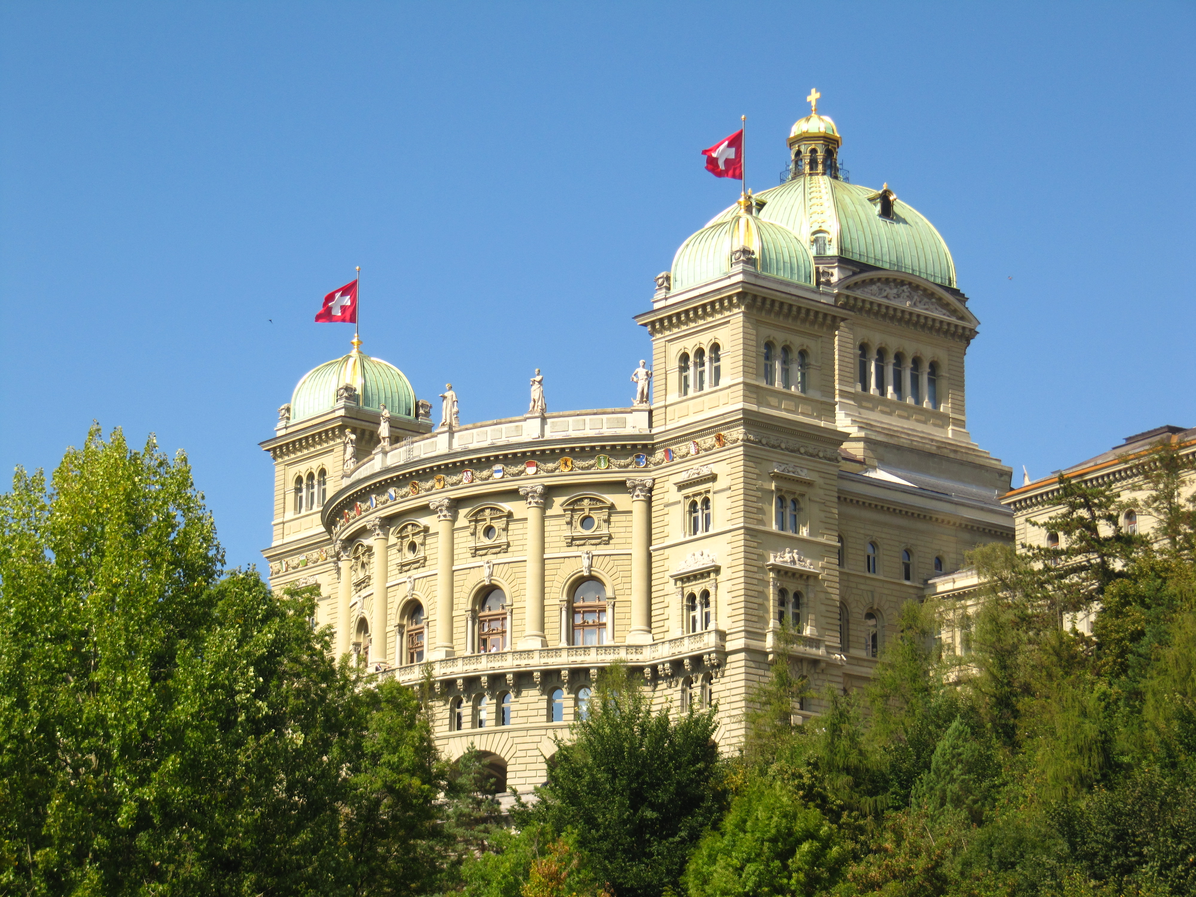 Stadt Bern: Bundeshaus während der Herbstsession, vom Schwellenmätteli aus photographiert